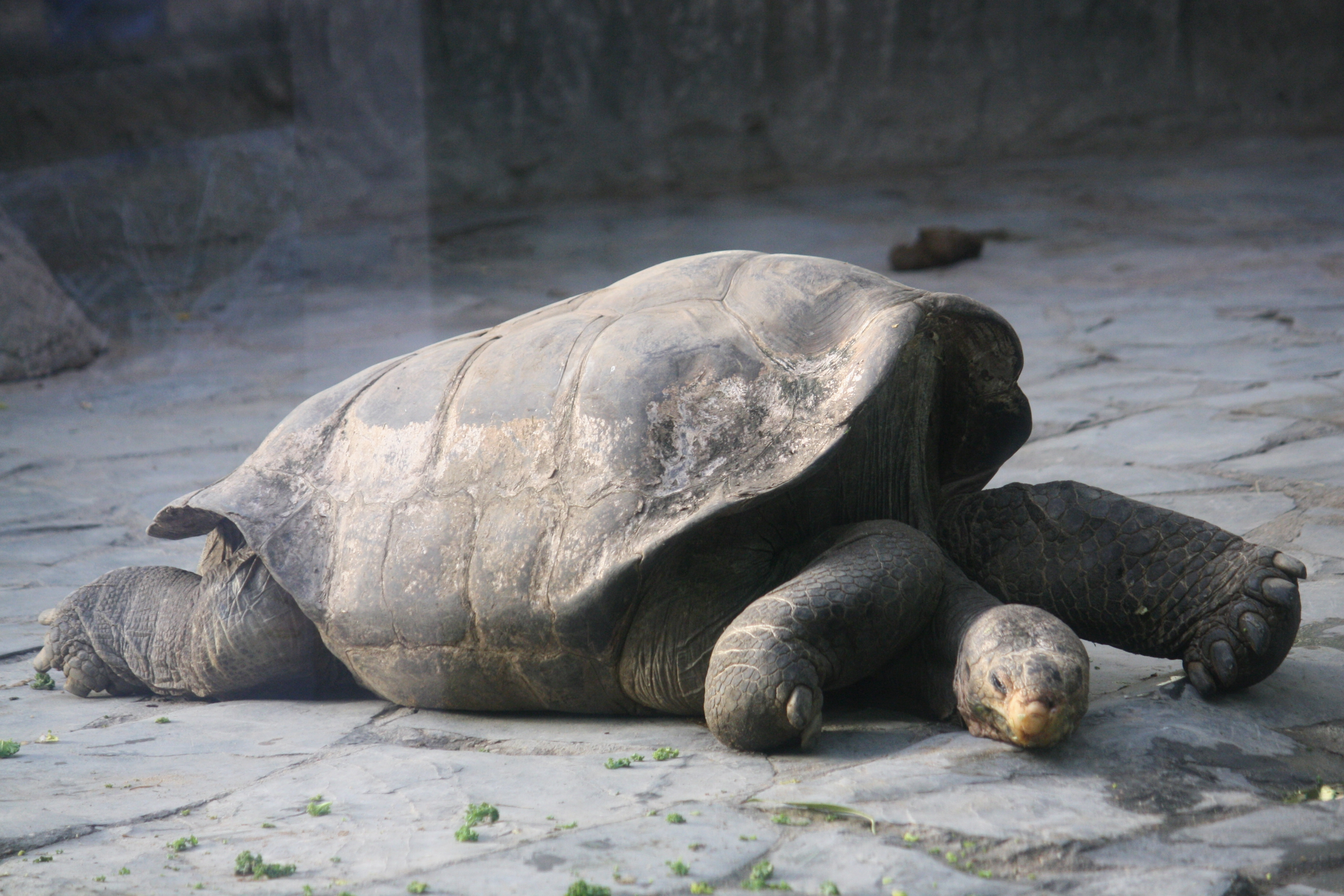 Želva sloní pinzónská v pražské ZOO, jediný exemplář tohoto poddruhu mimo Galapágy